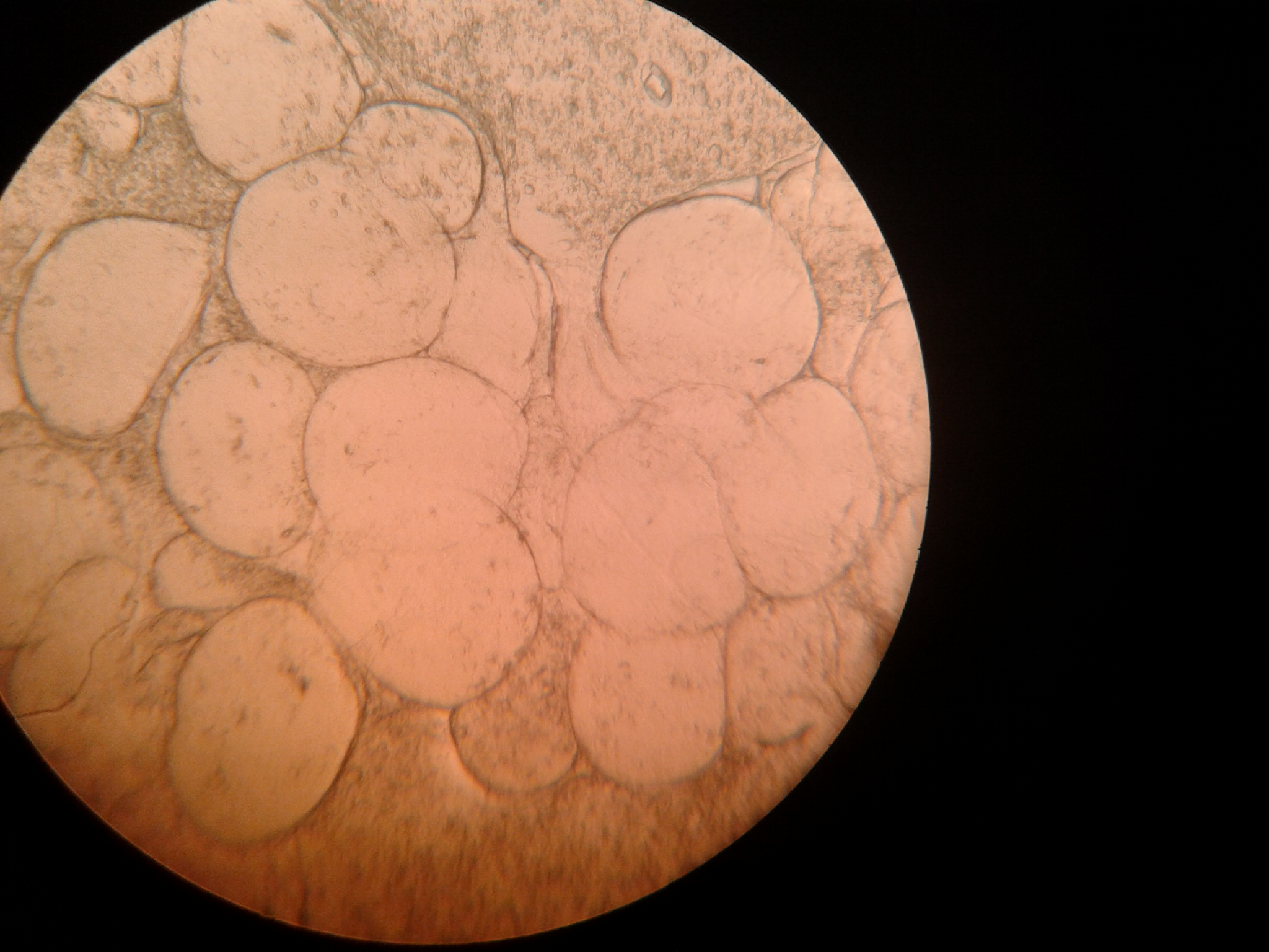 adipocitos tocino de cerdo